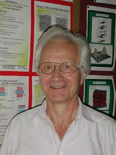 Prof. Dr. Siegfried Hess